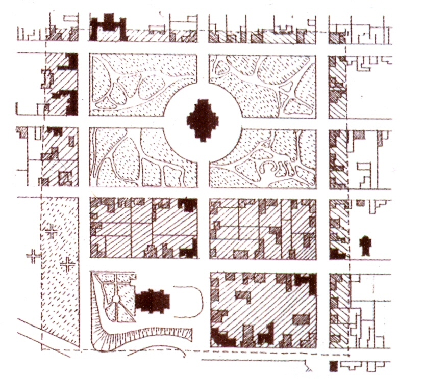 План Соборной площади с зданием собора в центре (1898 г.)